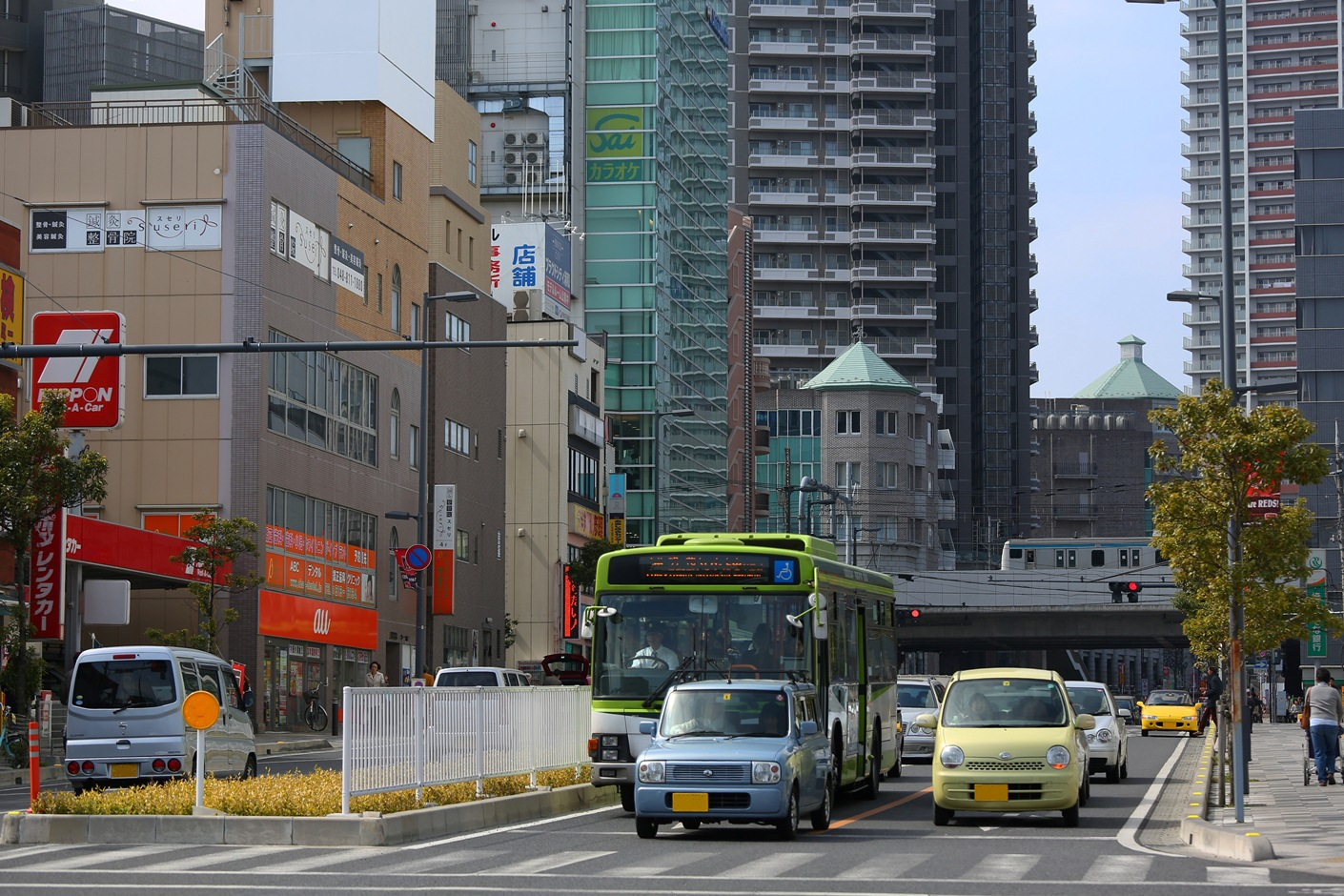 田島大牧線浦和駅付近